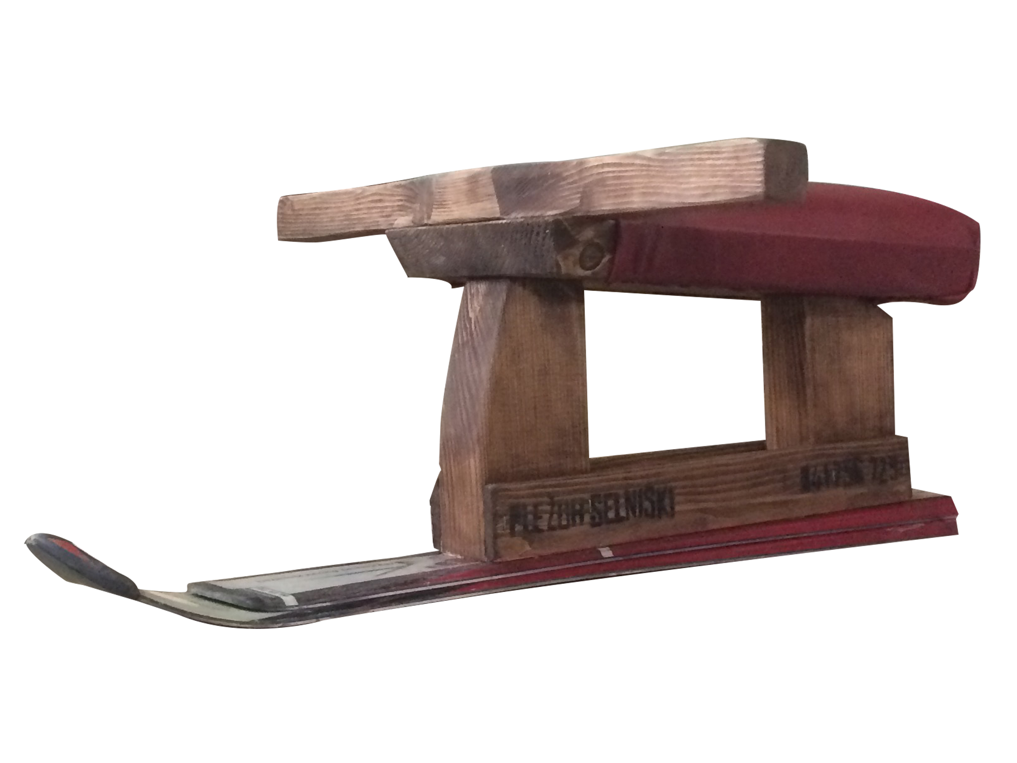 Pležuh strokovne izdelave